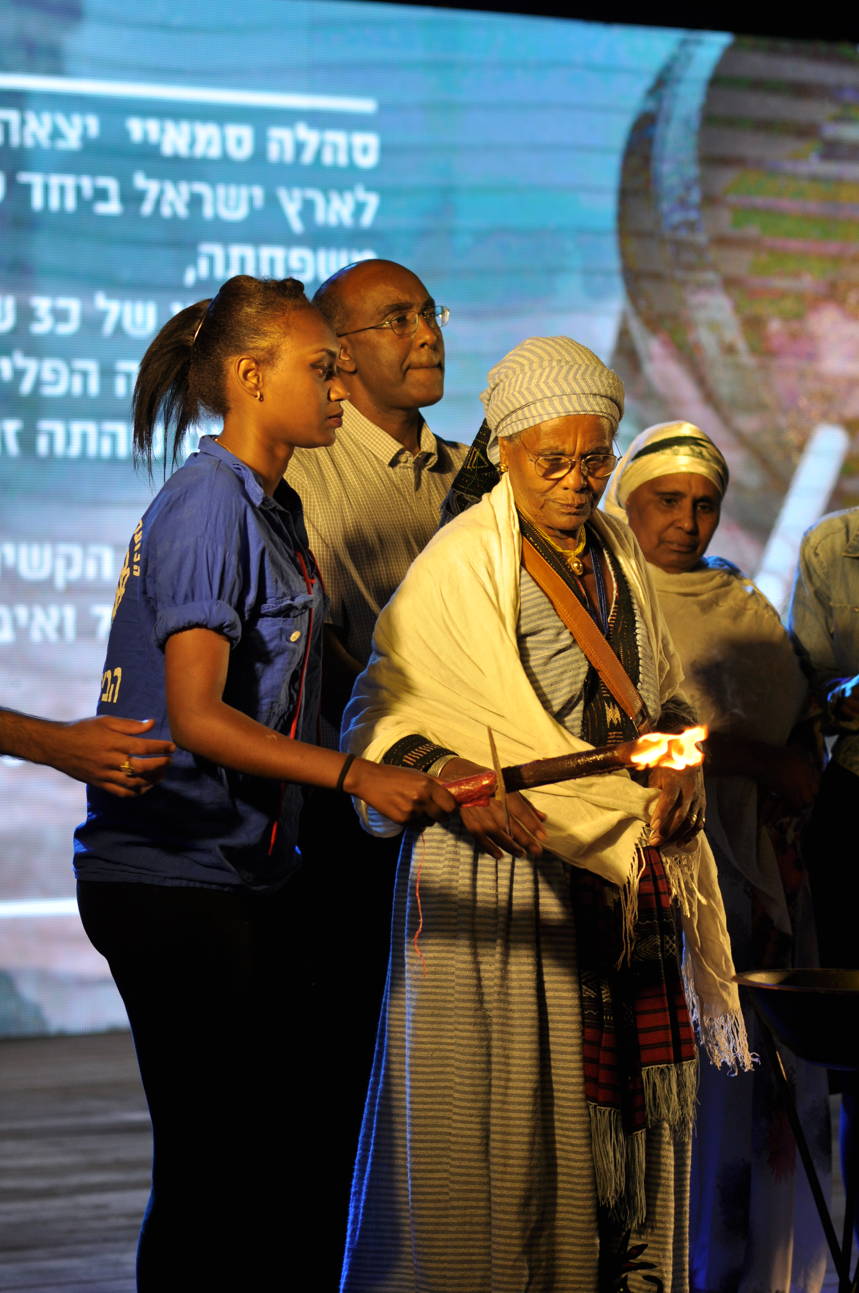 אביצ'ו בירוק, מדליקה משואה בטקס זיכרון לנספי יהדות אתיופיה בדרכה לישראל לזכר אמה סהלה סמאיי ושני ילדיה: אסמרו וסיסאי, שנפטרו במחנה הפליטים בסודן בשל התנאים הקשים. טקס יום הזיכרון לנספי המסע לארץ ישראל, נתניה, 2017